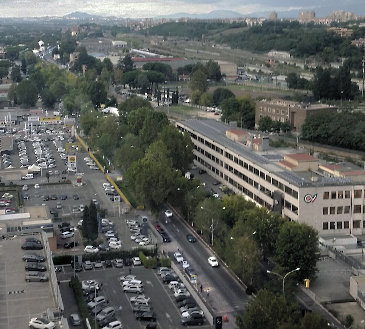 La strada statale 4 "Via Salaria" fotografata dall'alto a Roma, nei pressi dell'aeroporto dell'Urbe